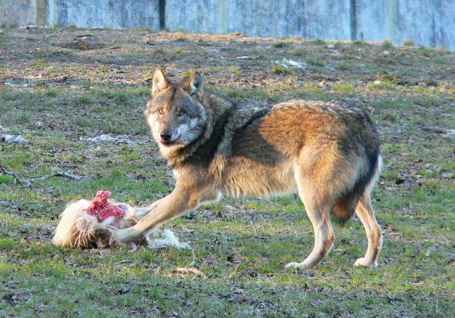 Im Tierpark Sababurg im Reinhardswald (Hessen), Wolf